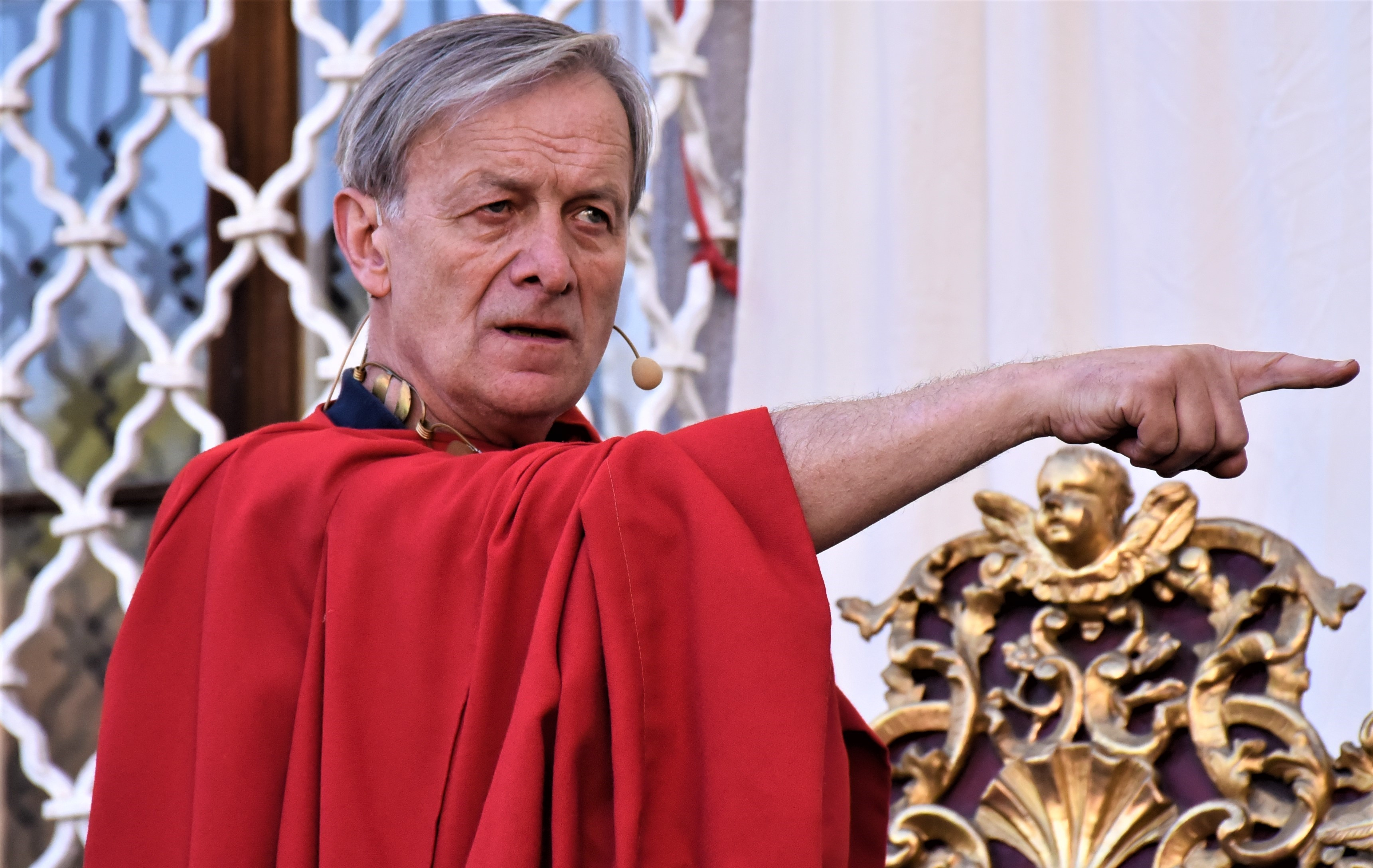 Jan Novotný, český herec (jako Pilát Pontský v "Pašijové hře")